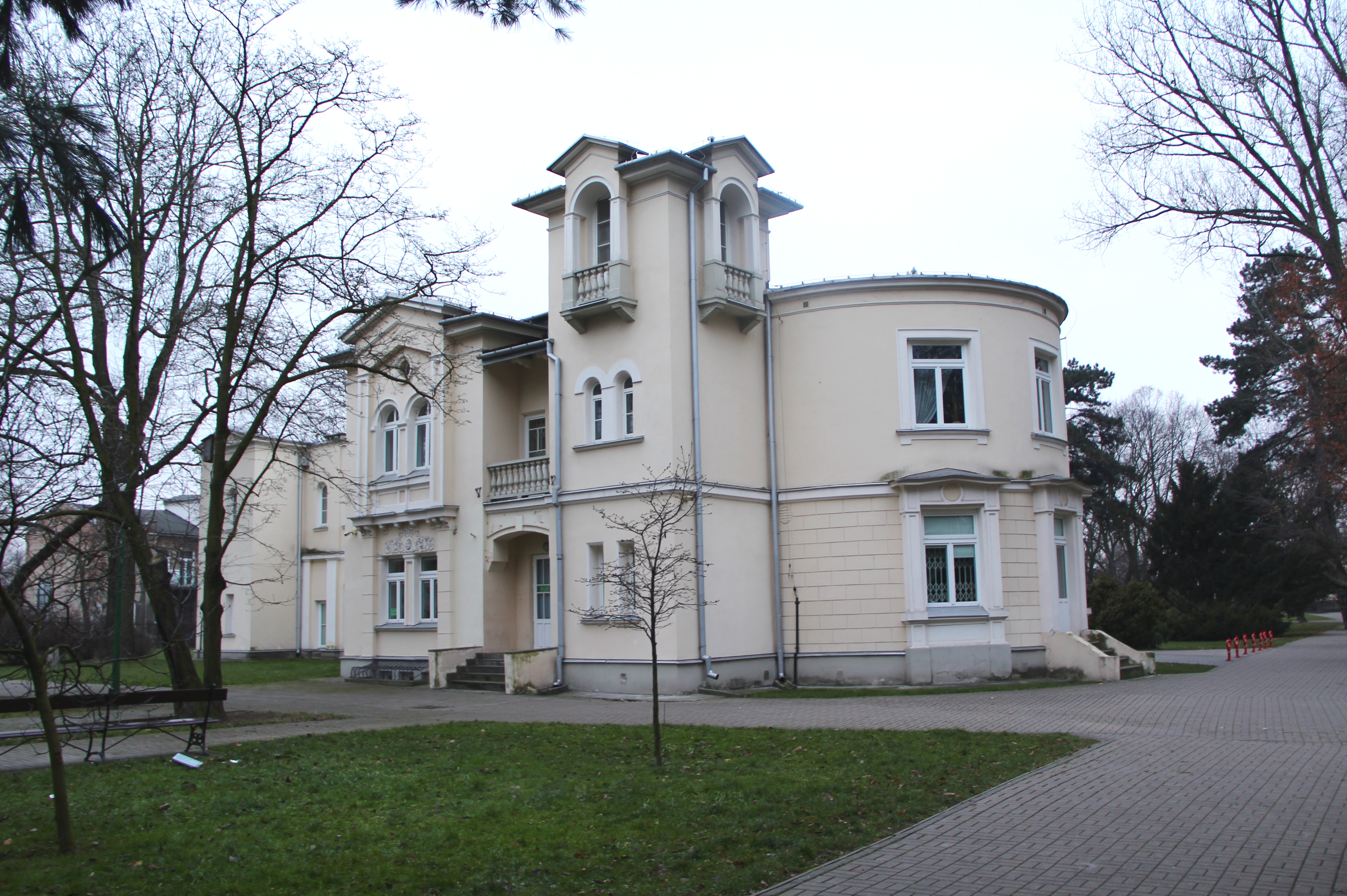 Koelichen Palace in Warsaw